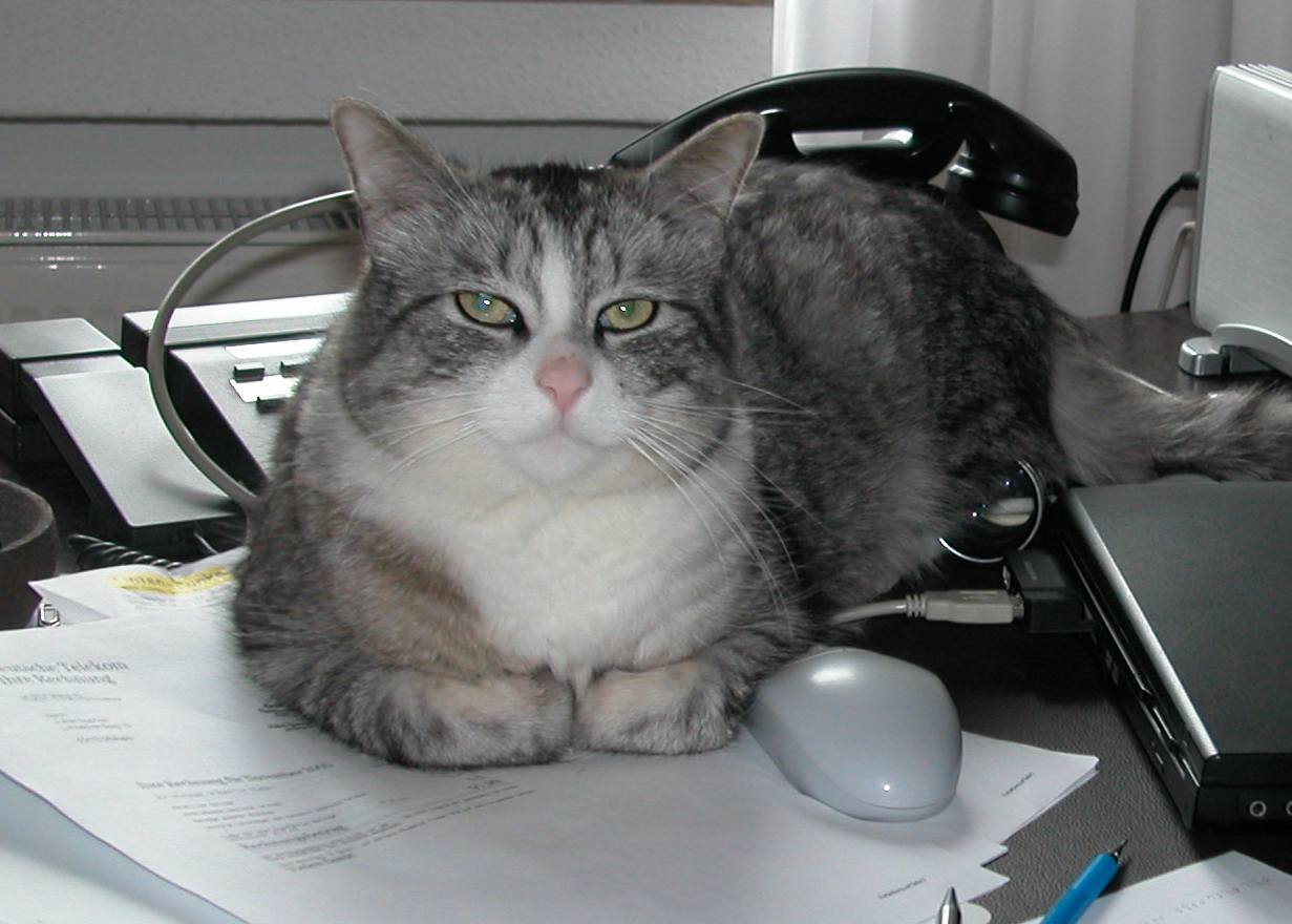 Hauskatze als Administrator